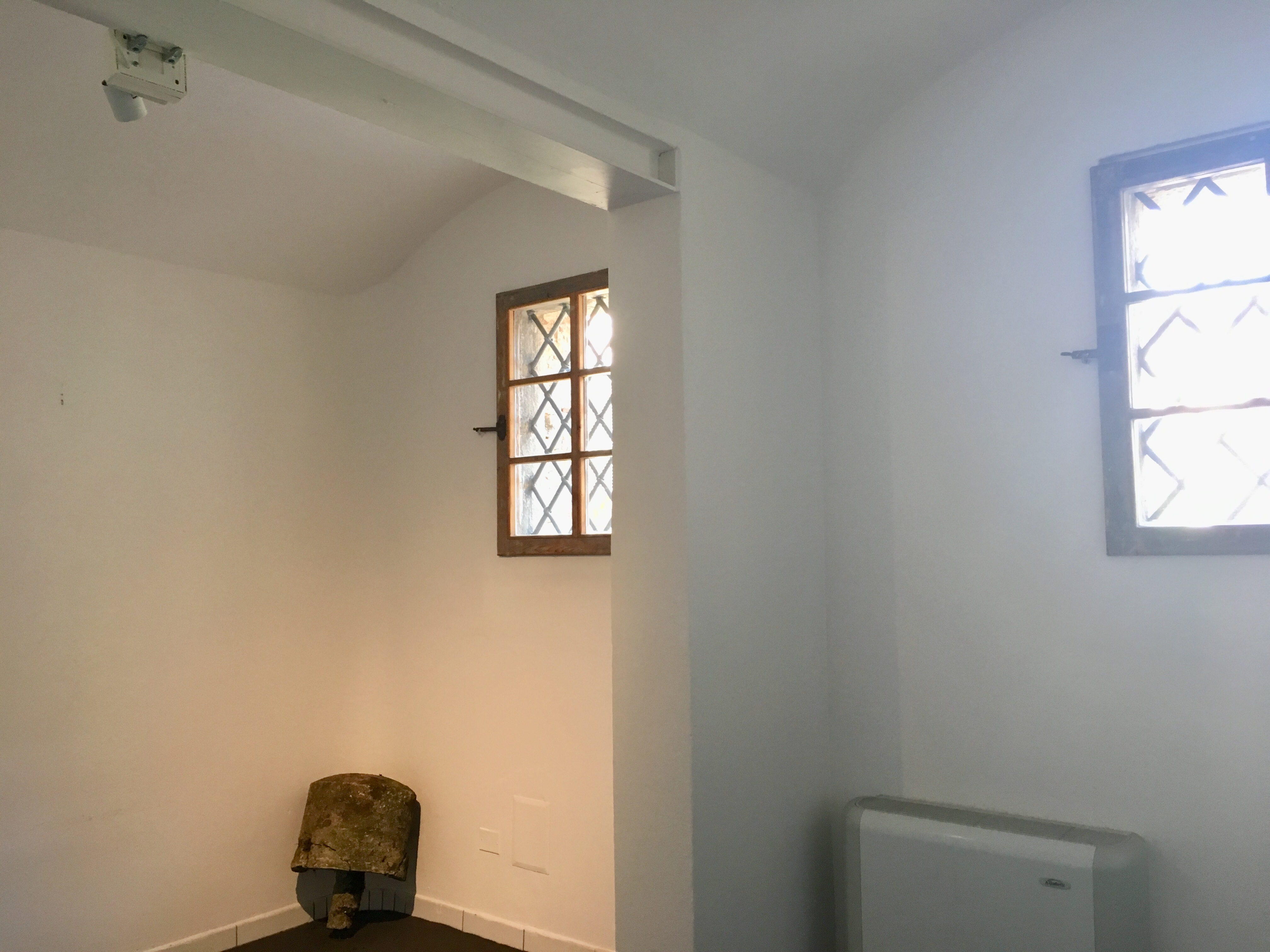 Le Murate. Due celle unite tramite cerchiatura muraria